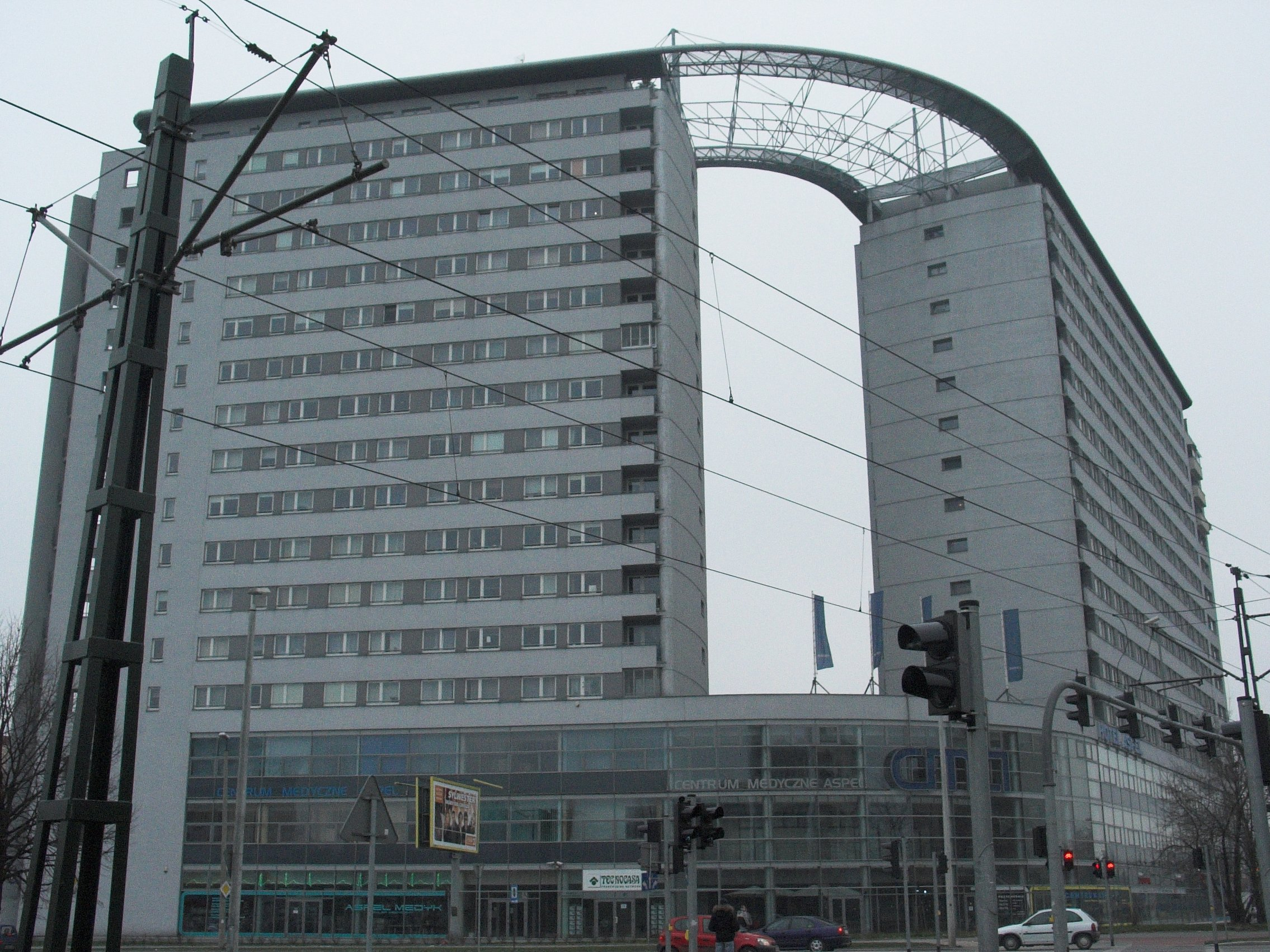 Dom Wschodzącego Słońca w Krakowie, Polska